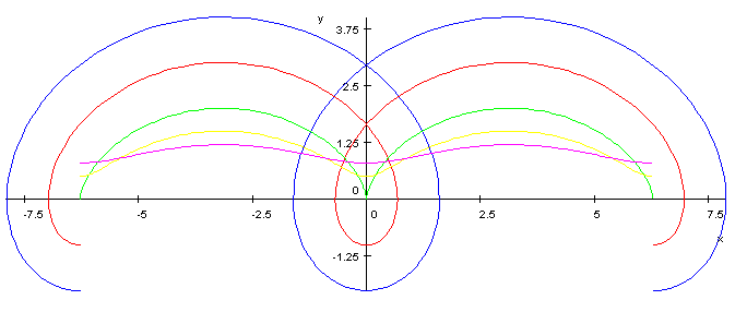 Trochoid